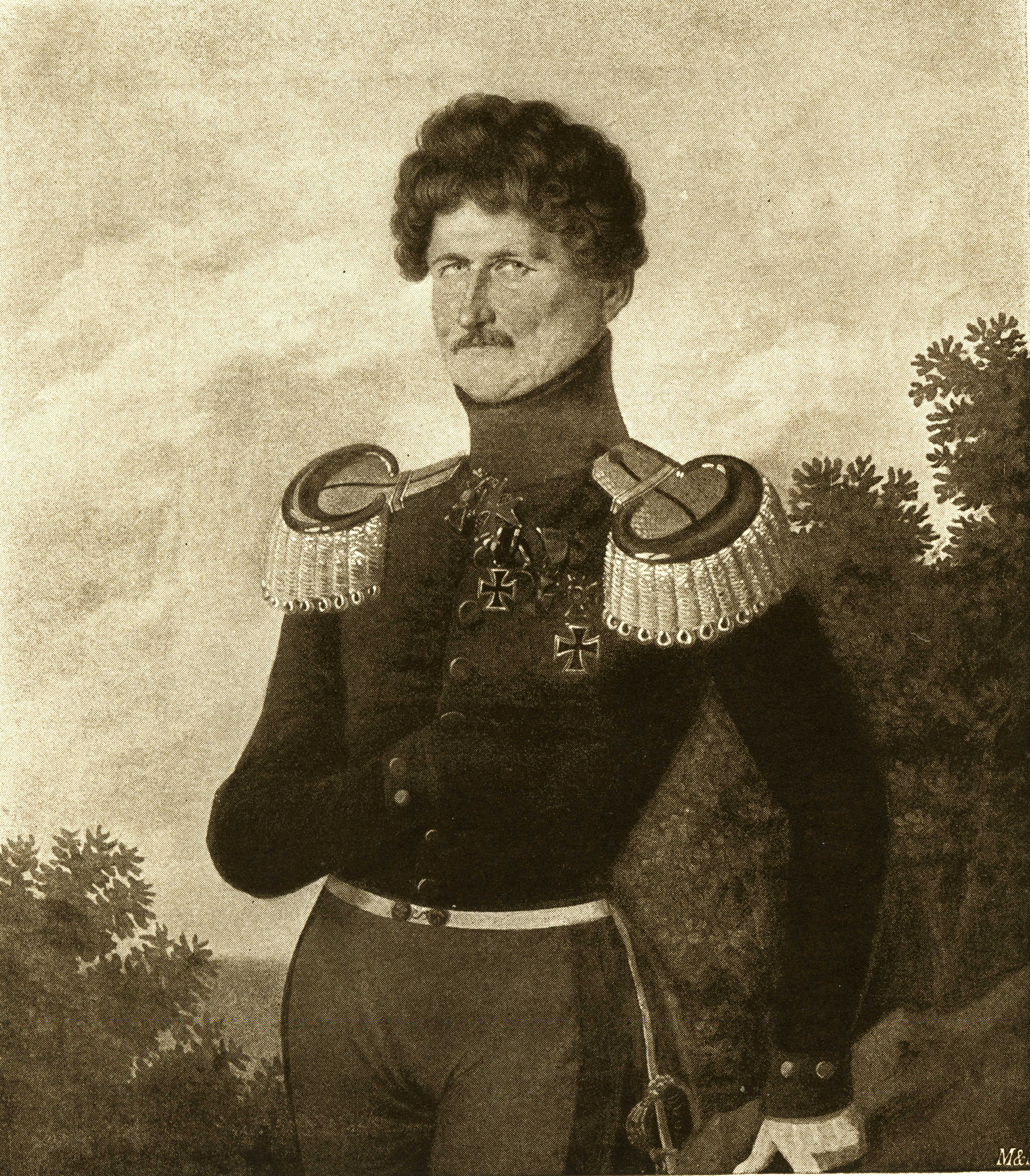 Friedrich von Eisenhart als Generalmajor nach einem zeitgenössischem Ölgemälde